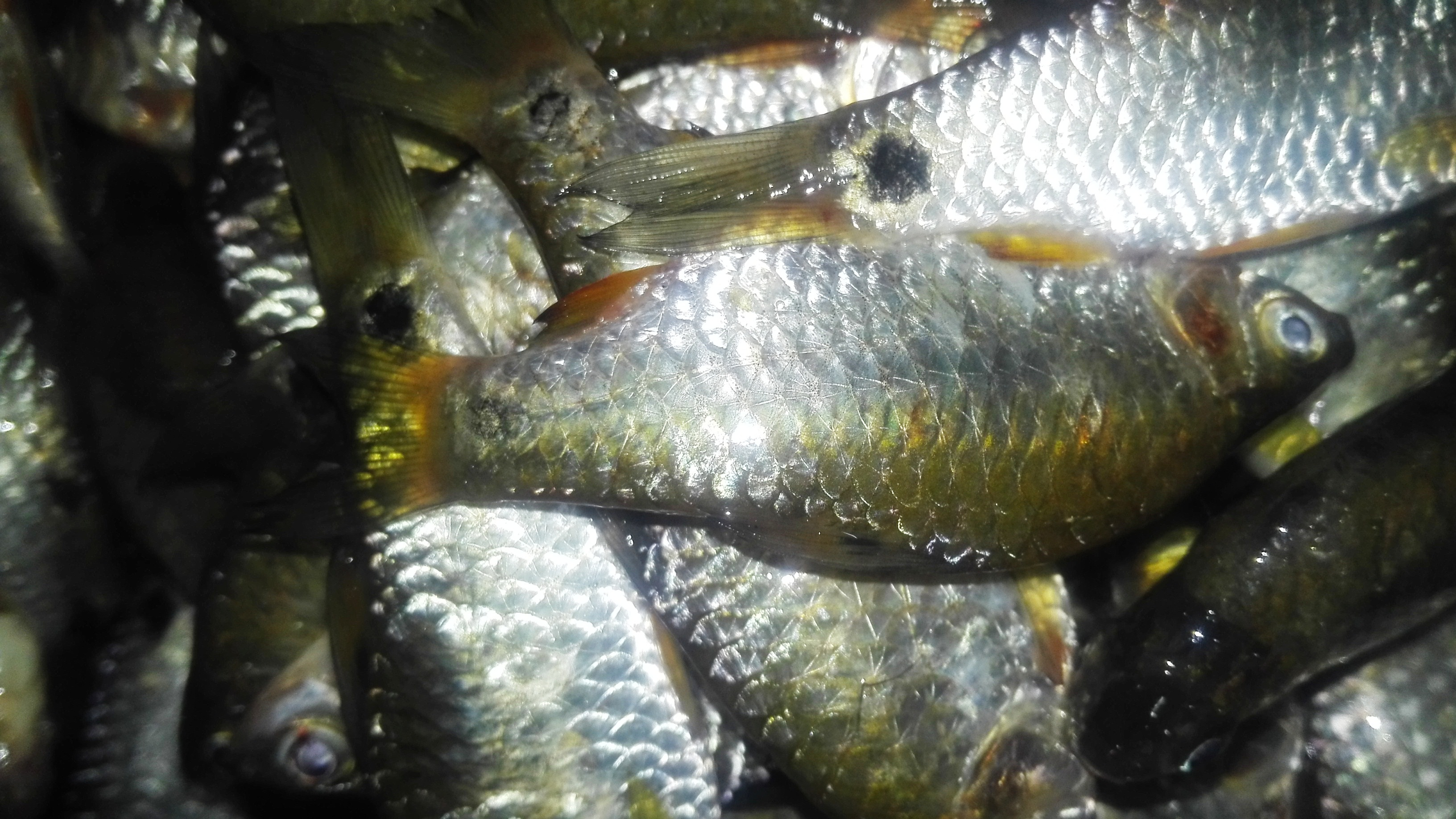 Bangladeshi fish